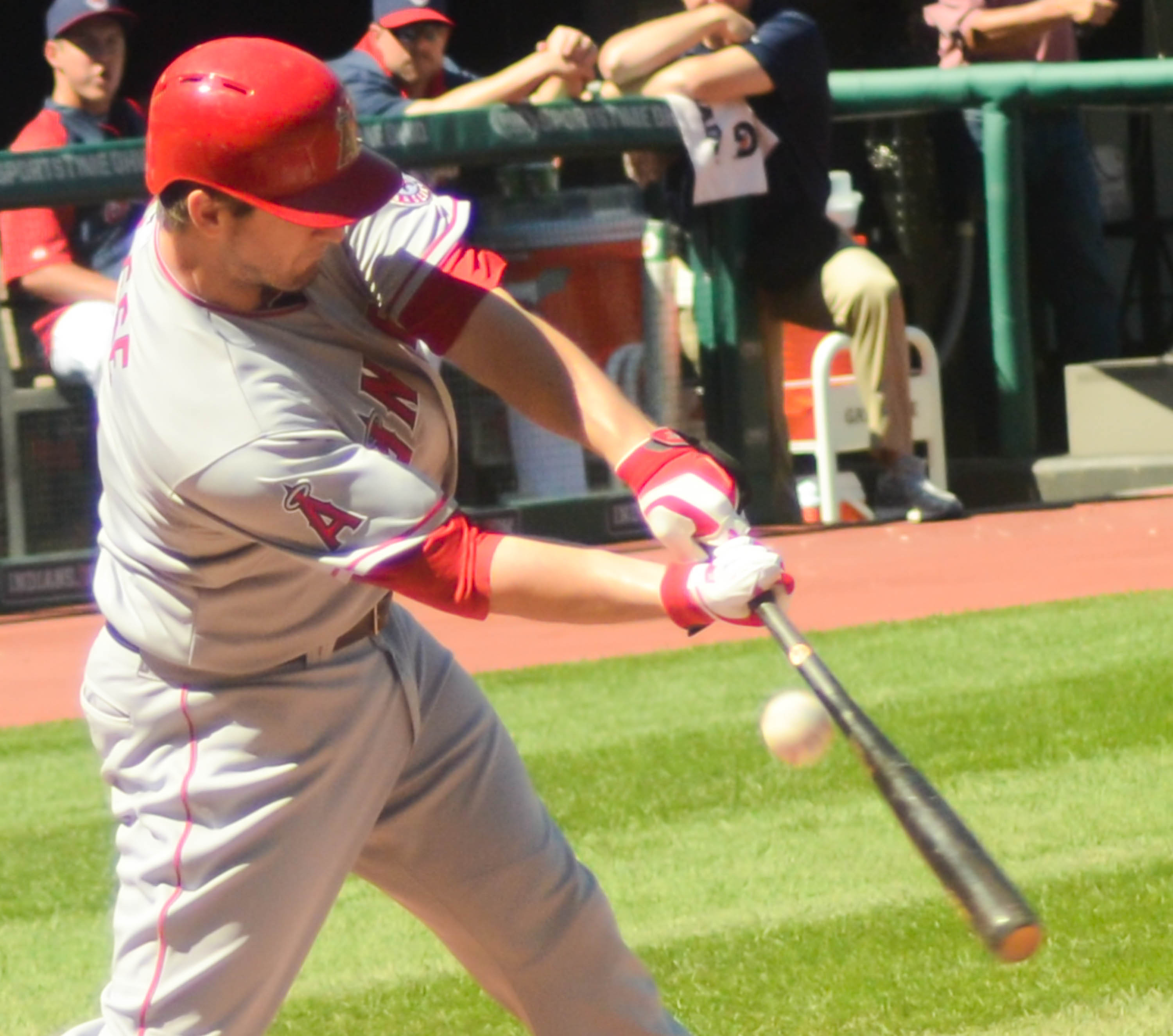 David Freese